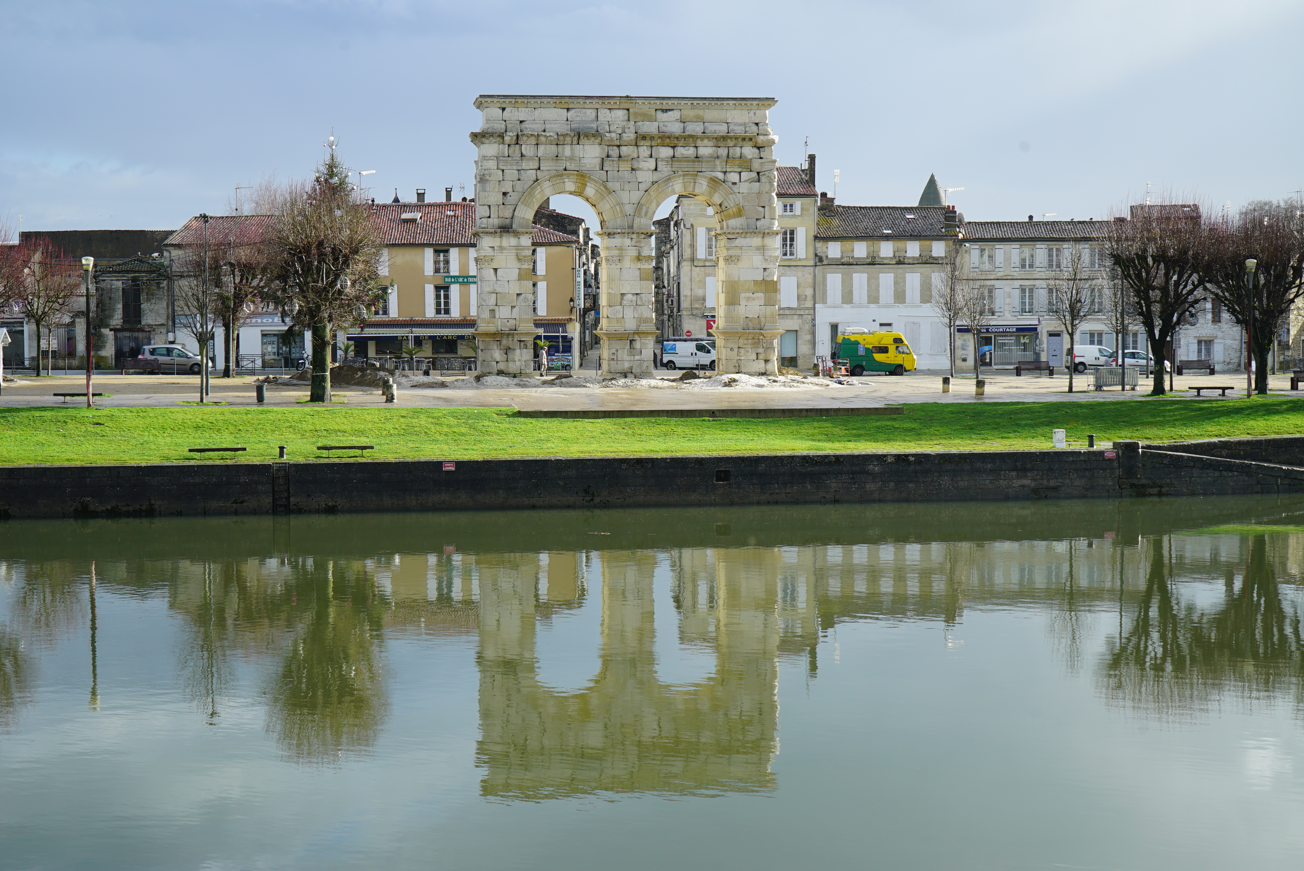 l'arc de Germanicus se reflétant dans la charente.